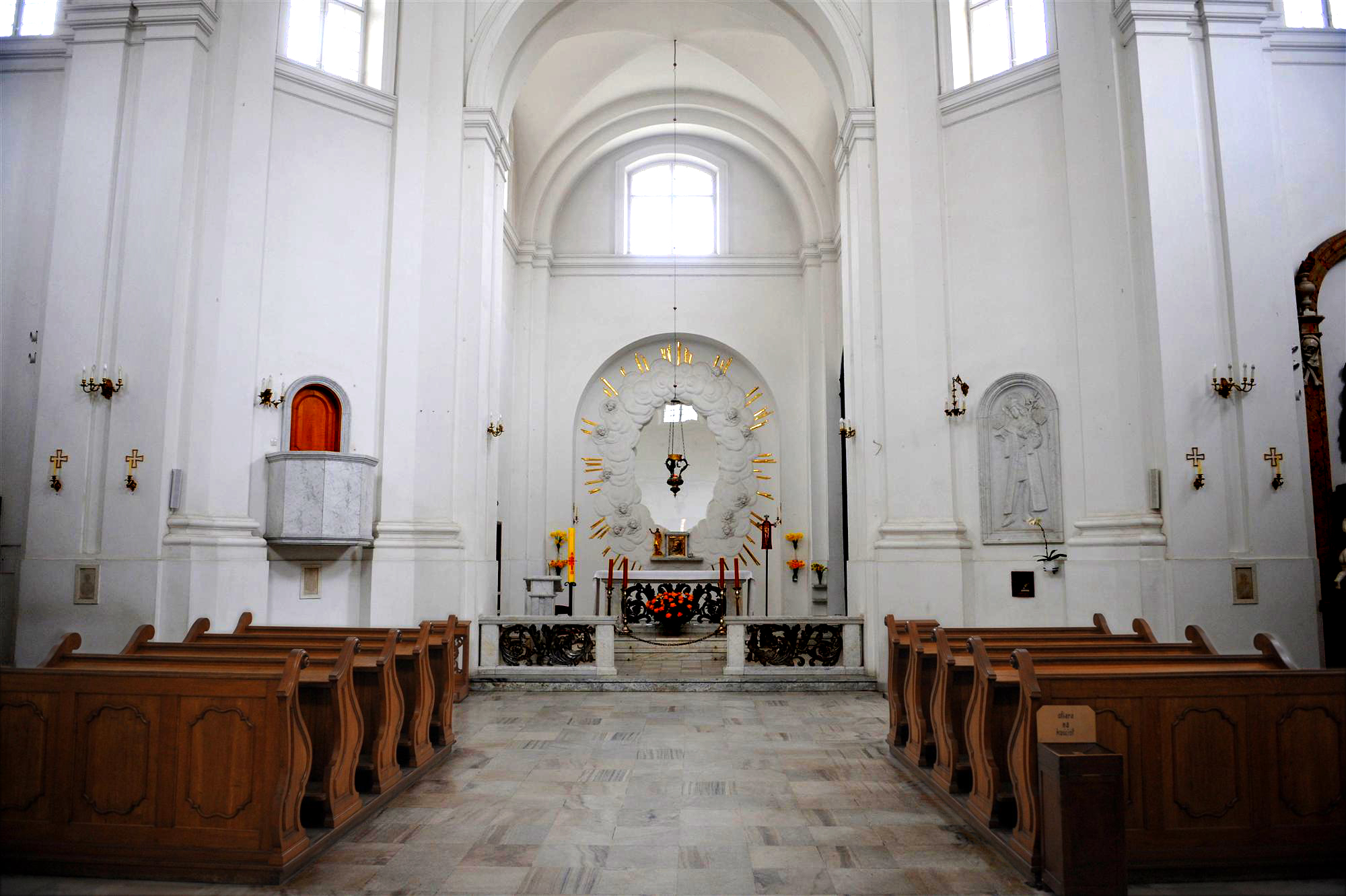 Wnętrze warszawskiego kościóła Sakramentek pod wezwaniem św. Kazimierza